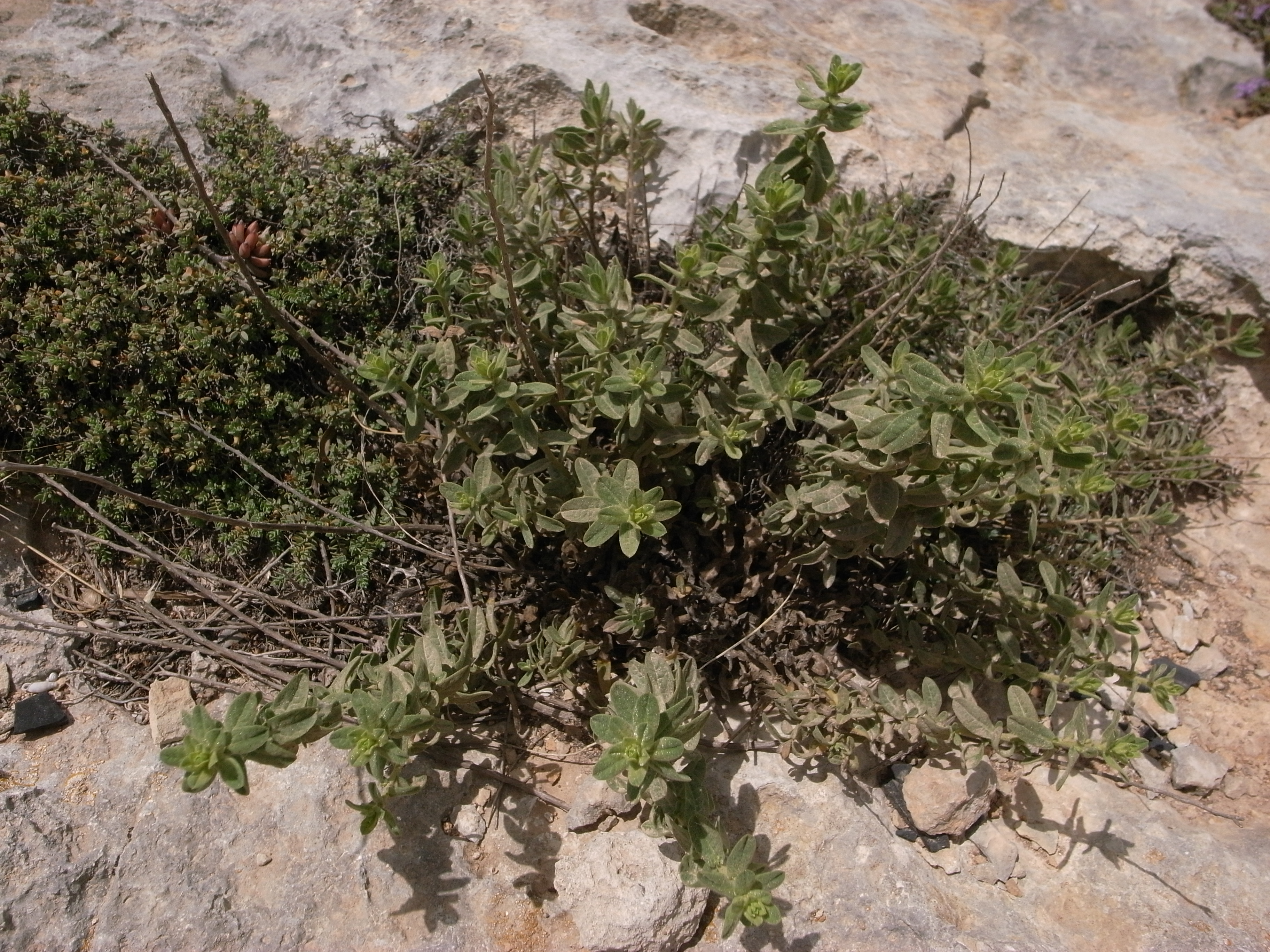 Chiliadenus bocconei, Dingli Cliffs, Malta